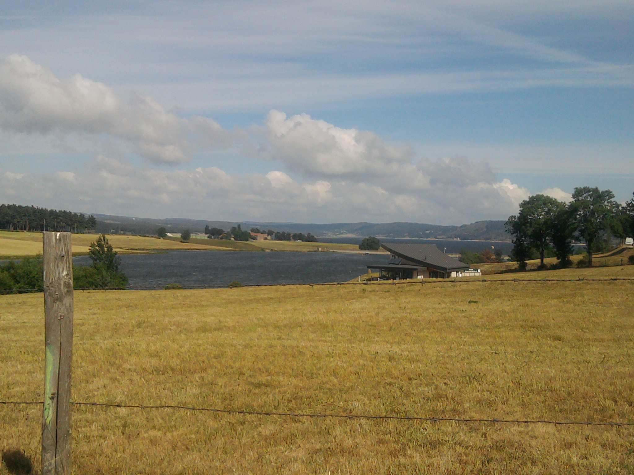 Lac de Naussac